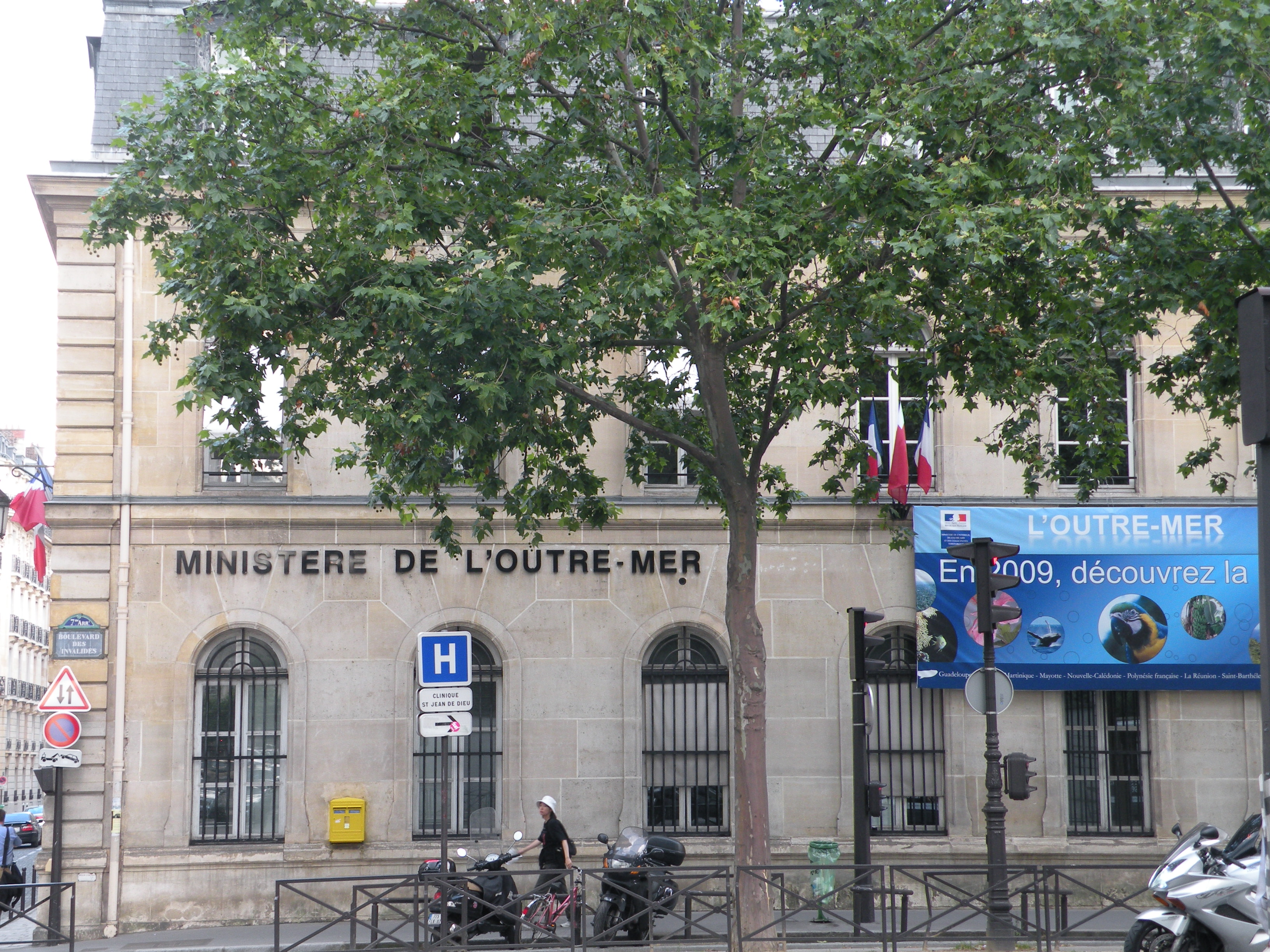 Façade du Ministère de l'Outre-mer à Paris, boulevard des Invalides.